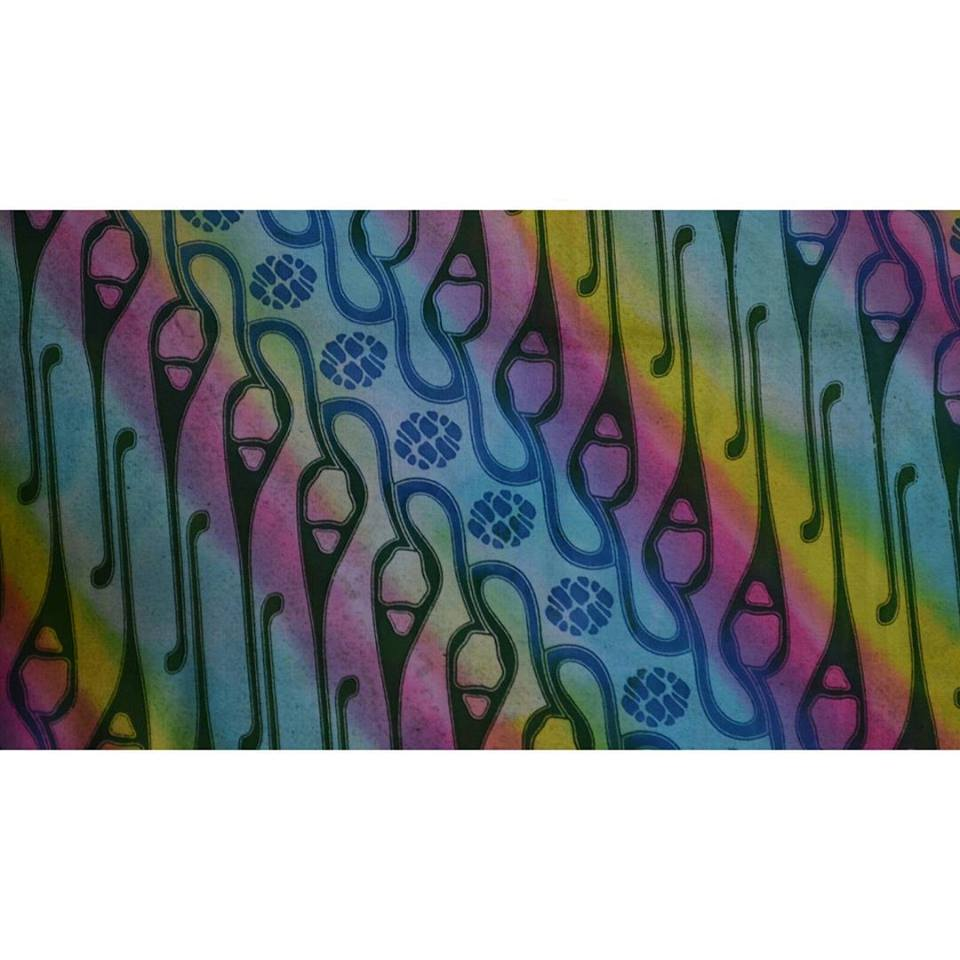 Batik Plumpungan merupakan karya seni batik kontemporer. Motif dasarnya didesain dari Prasasti Plumpungan yang menandai lahirnya Kota Salatiga.